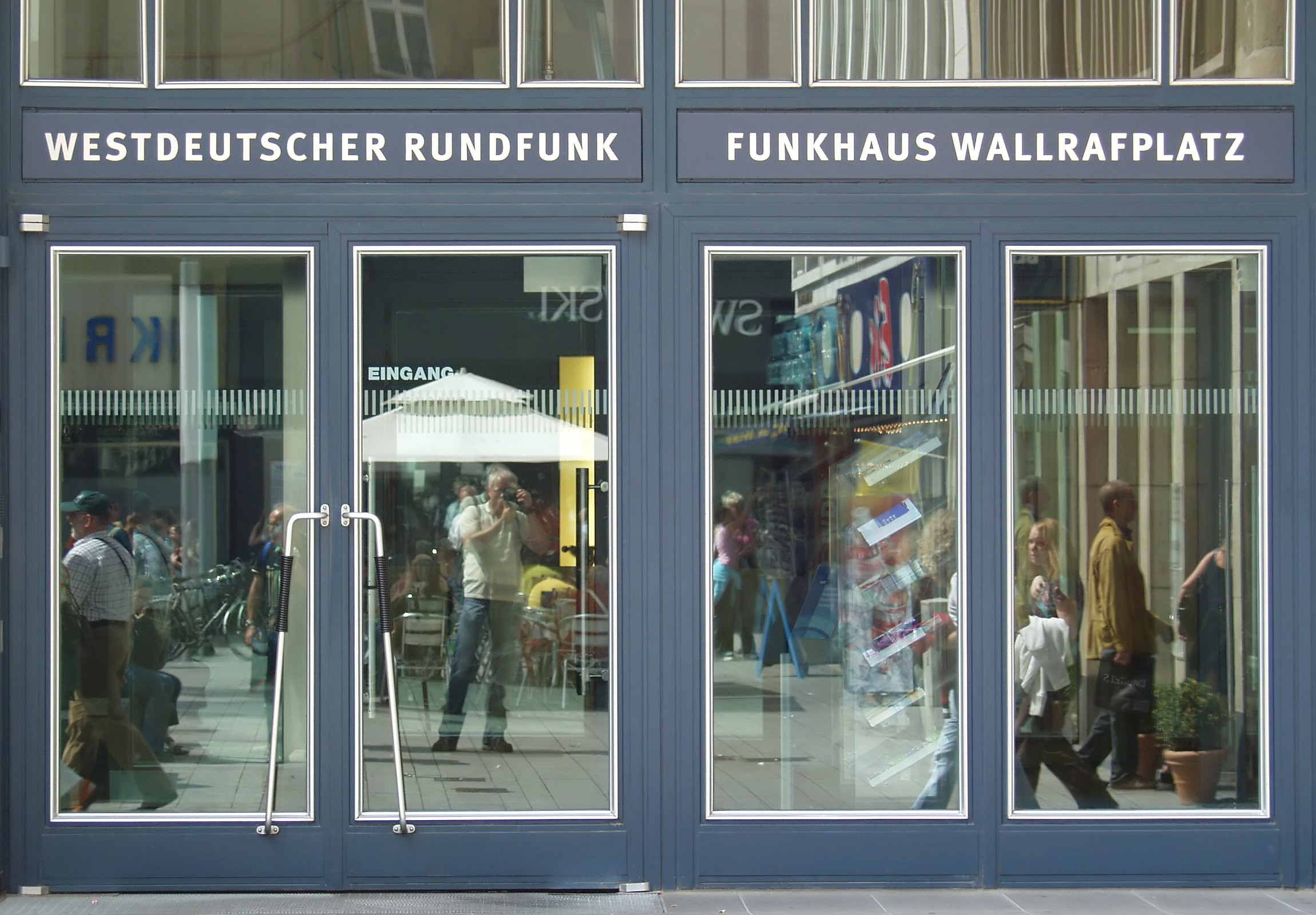 Eingangstür zum WDR-Funkhaus Wallrafplatz in Köln